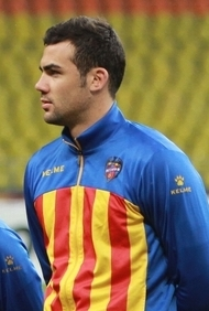 Prèvia del partit de tornada dels huitens de la Uefa Europa League